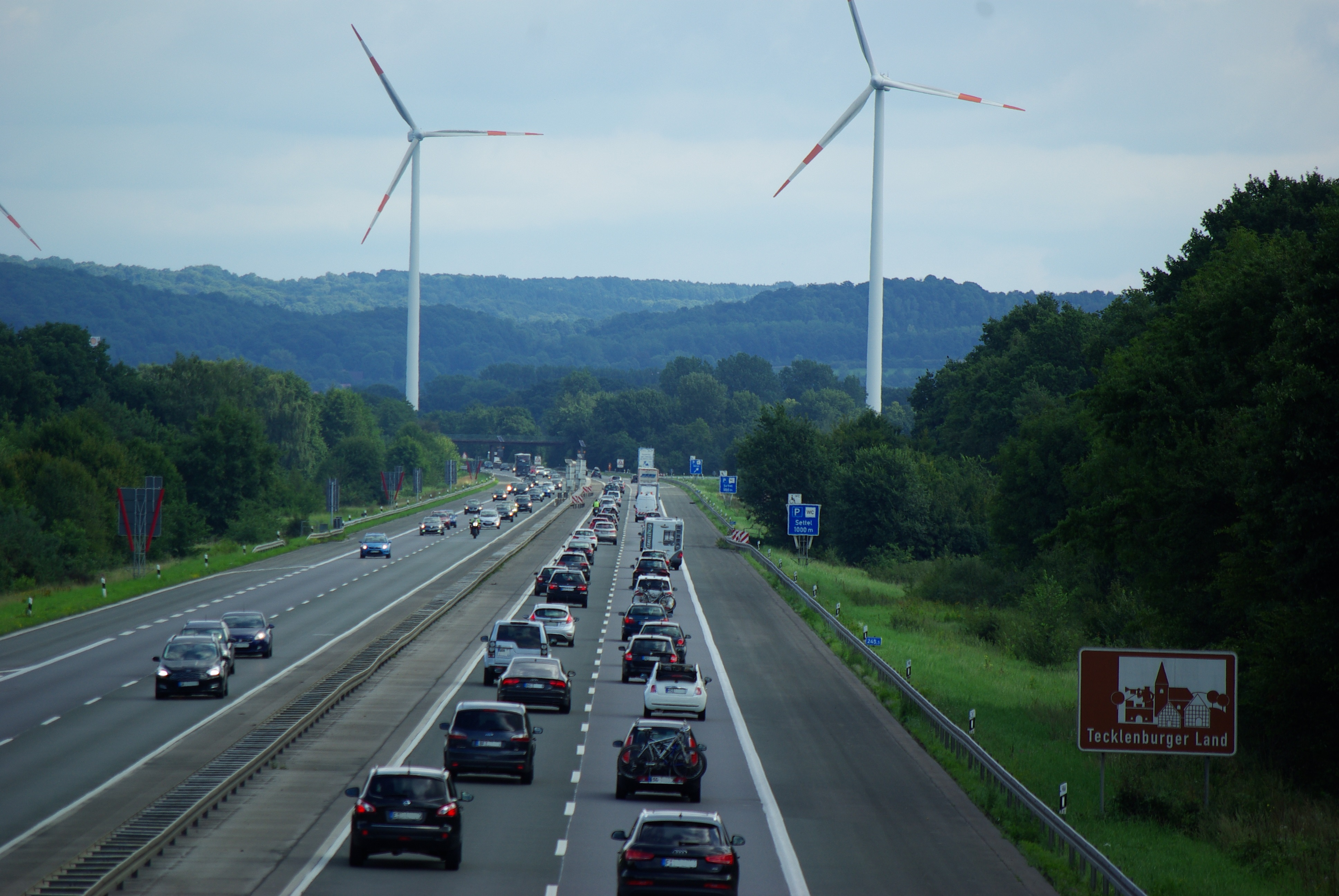 Autobahn 1 bei Ladbergen mit Hinweistafel Tecklenburger Land